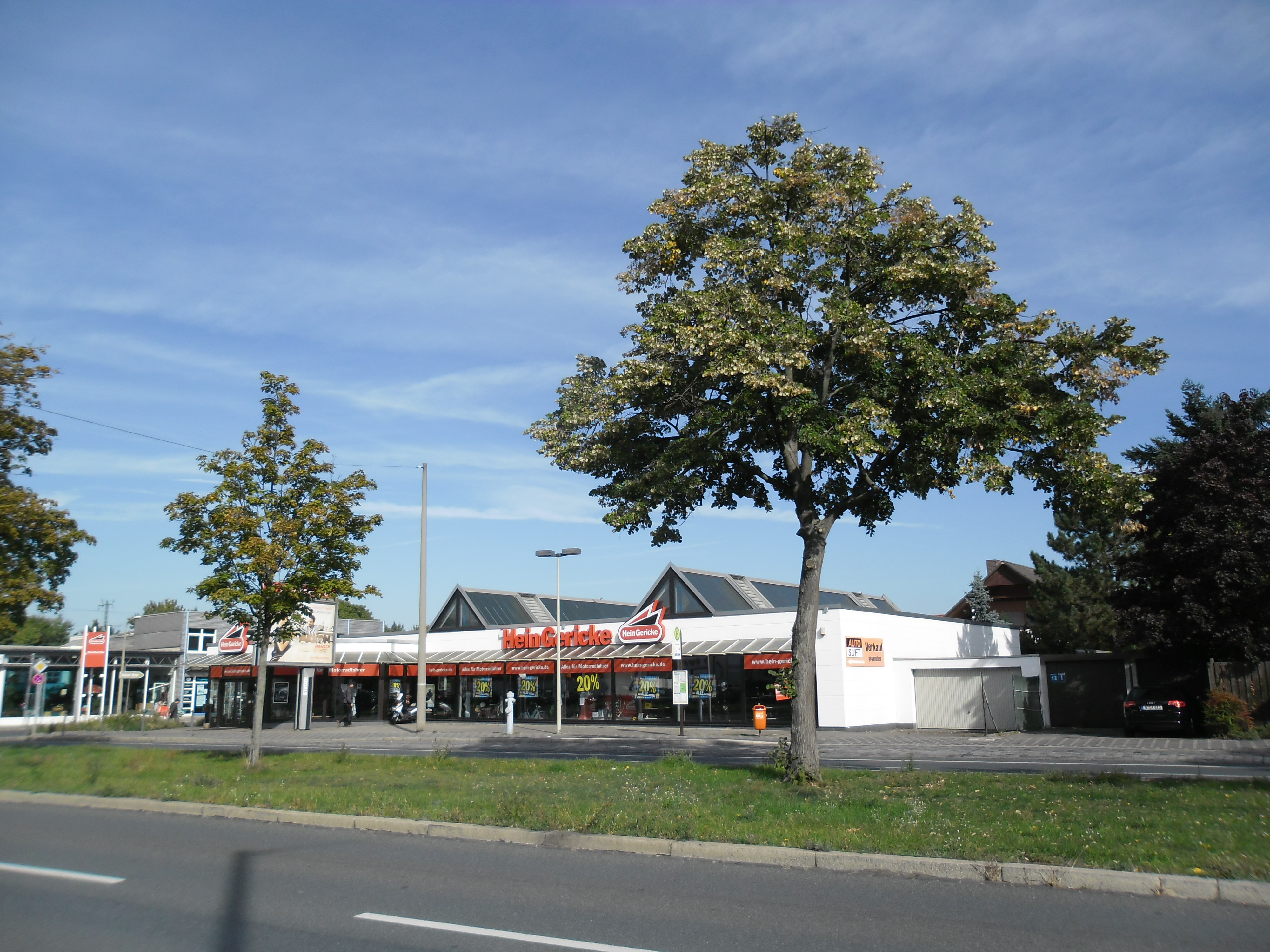 Hein Gericke Leyher Straße 114 Nürnberg 01